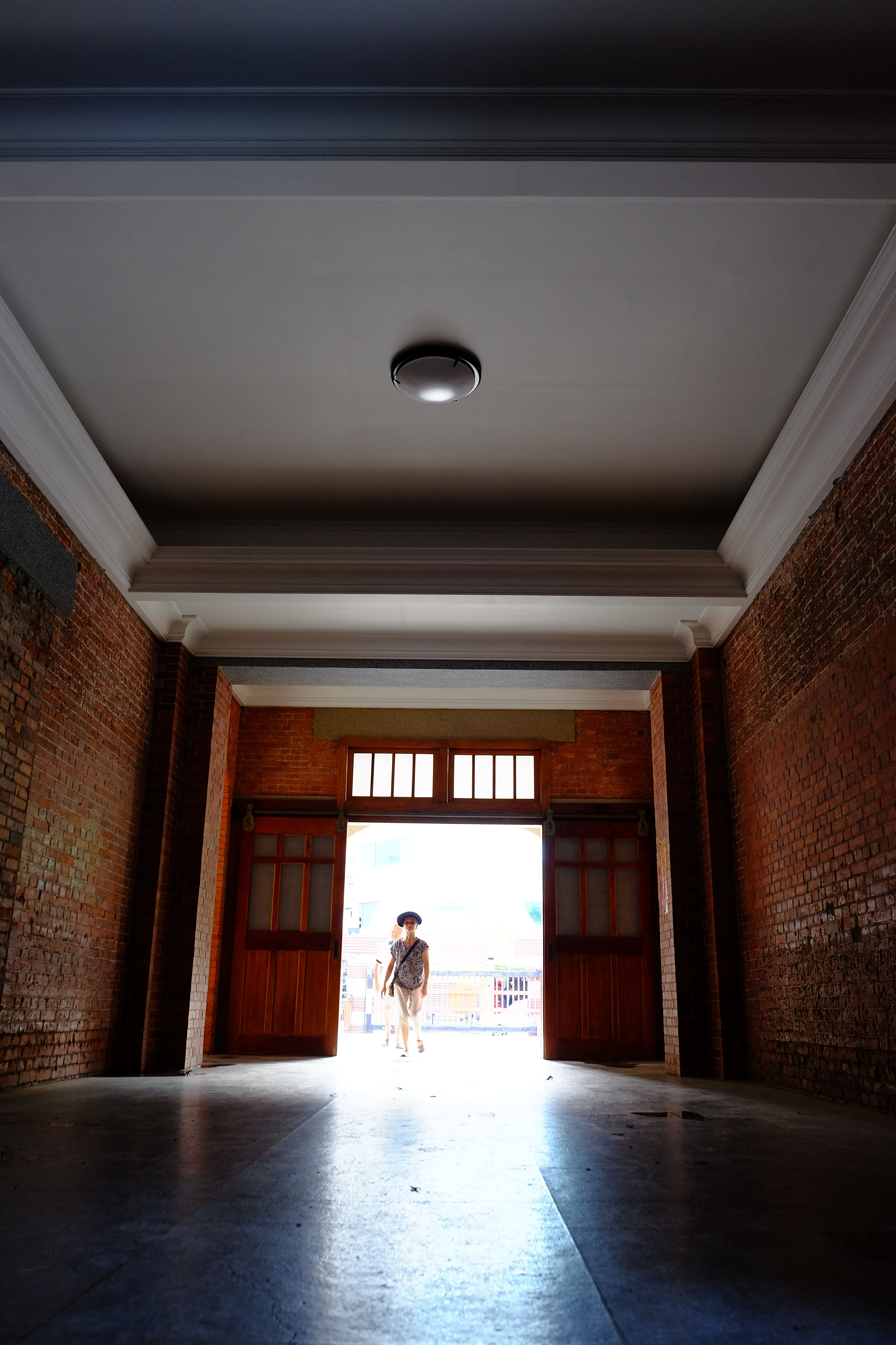 臺北市大同區日新國民小學 Taipei Municipal Rixin Elementary School